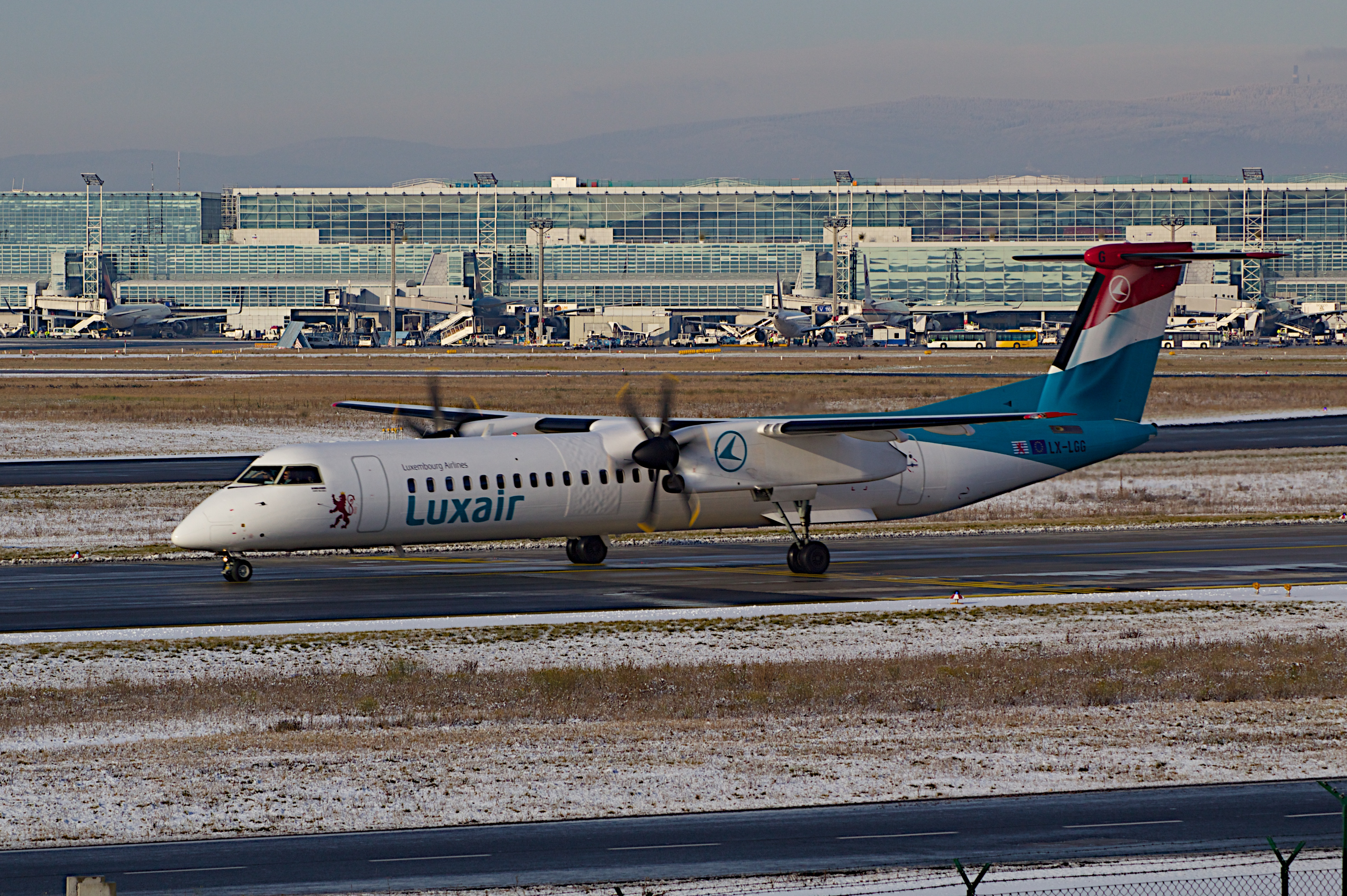 Luxair rollt zum Start am Flughafen Frankfurt.